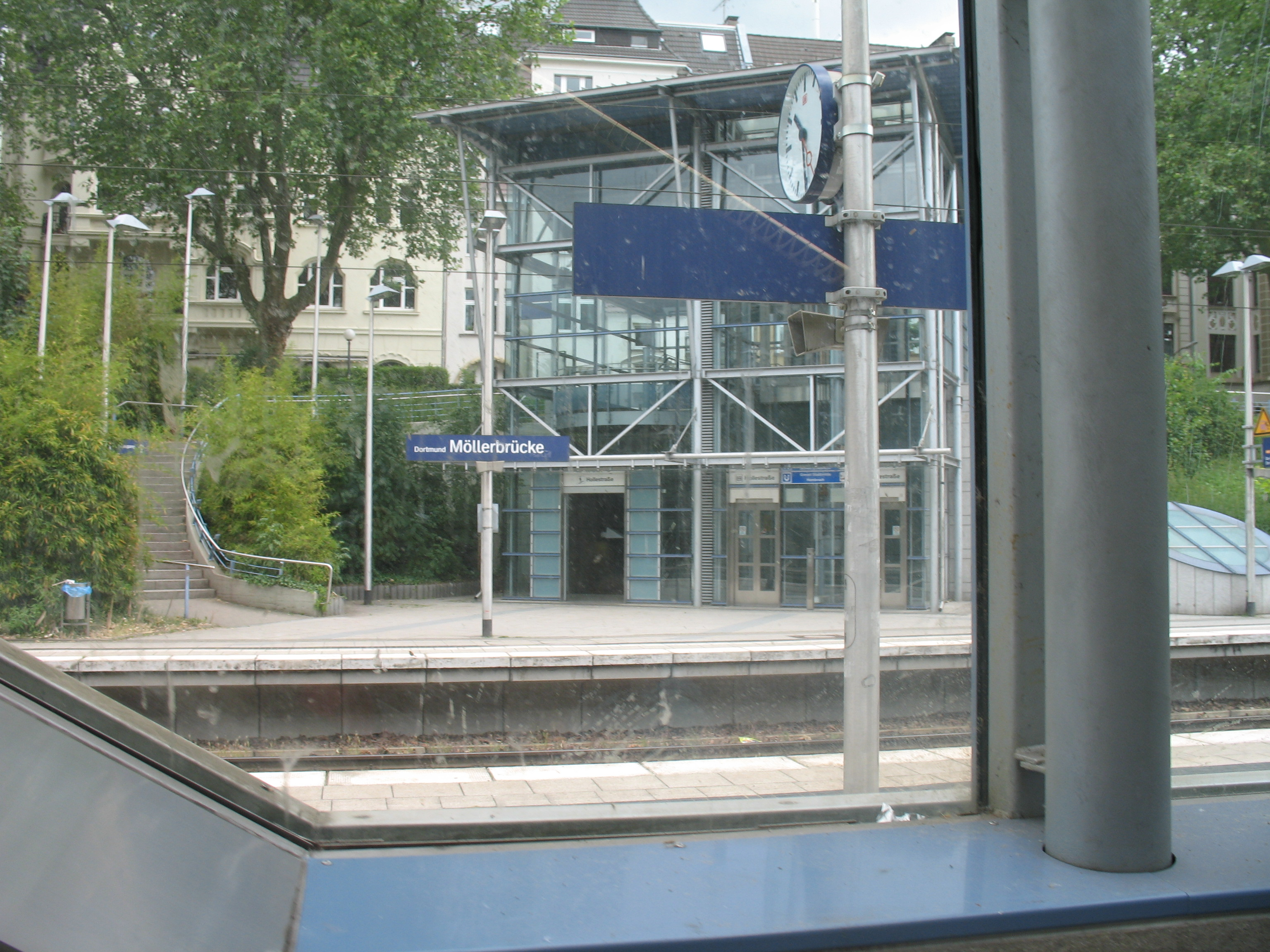 Blick von der Rolltreppe (U1-O1) auf die Gleise der S-Bahn S4. Blick Richtung Norden